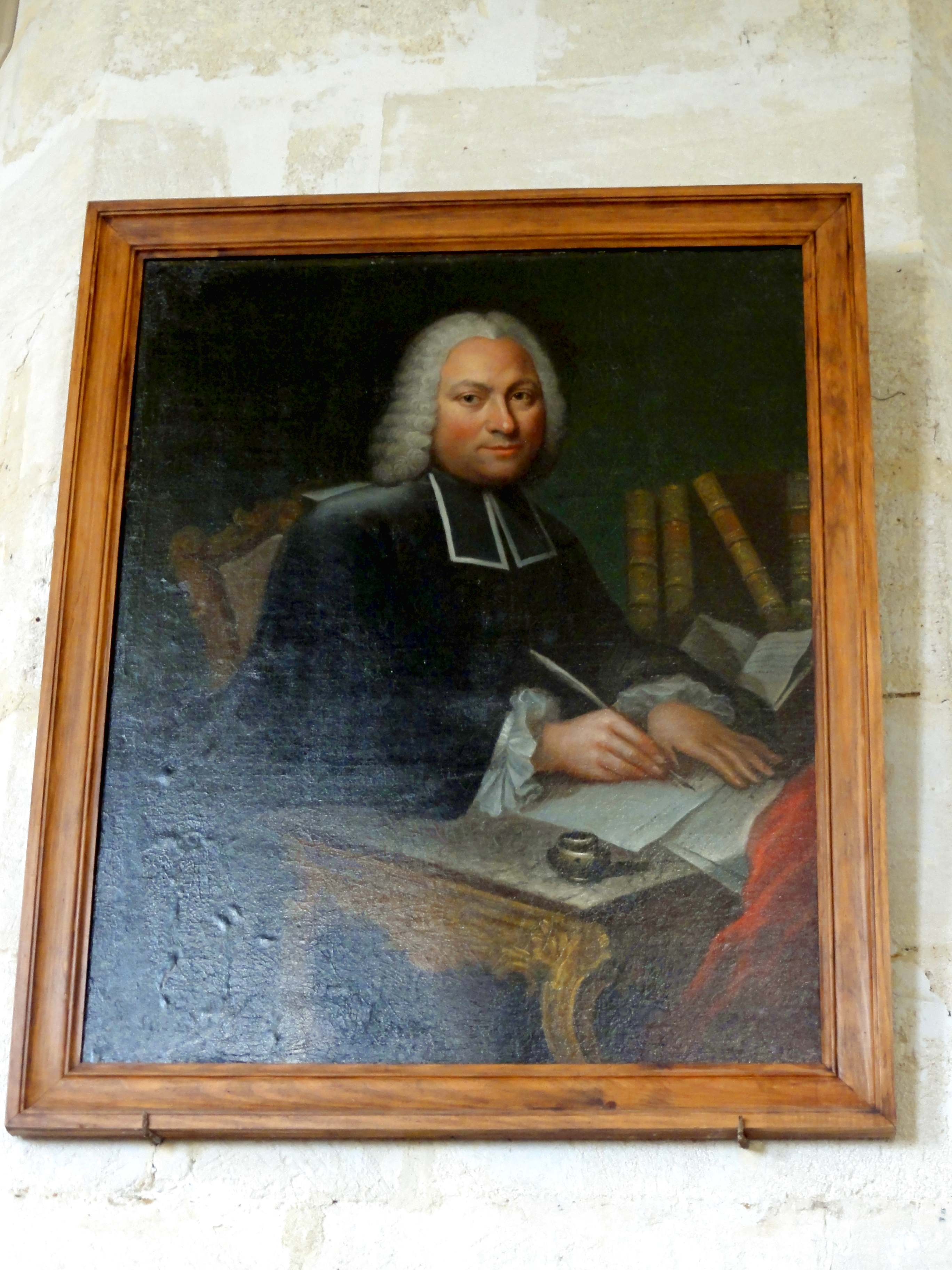 tableau - portrait de Mgr de Belloy (1709-1808), évêque de Marseille et archevêque de Paris, originaire de Beauvais, daté entre 1736 et 1751.